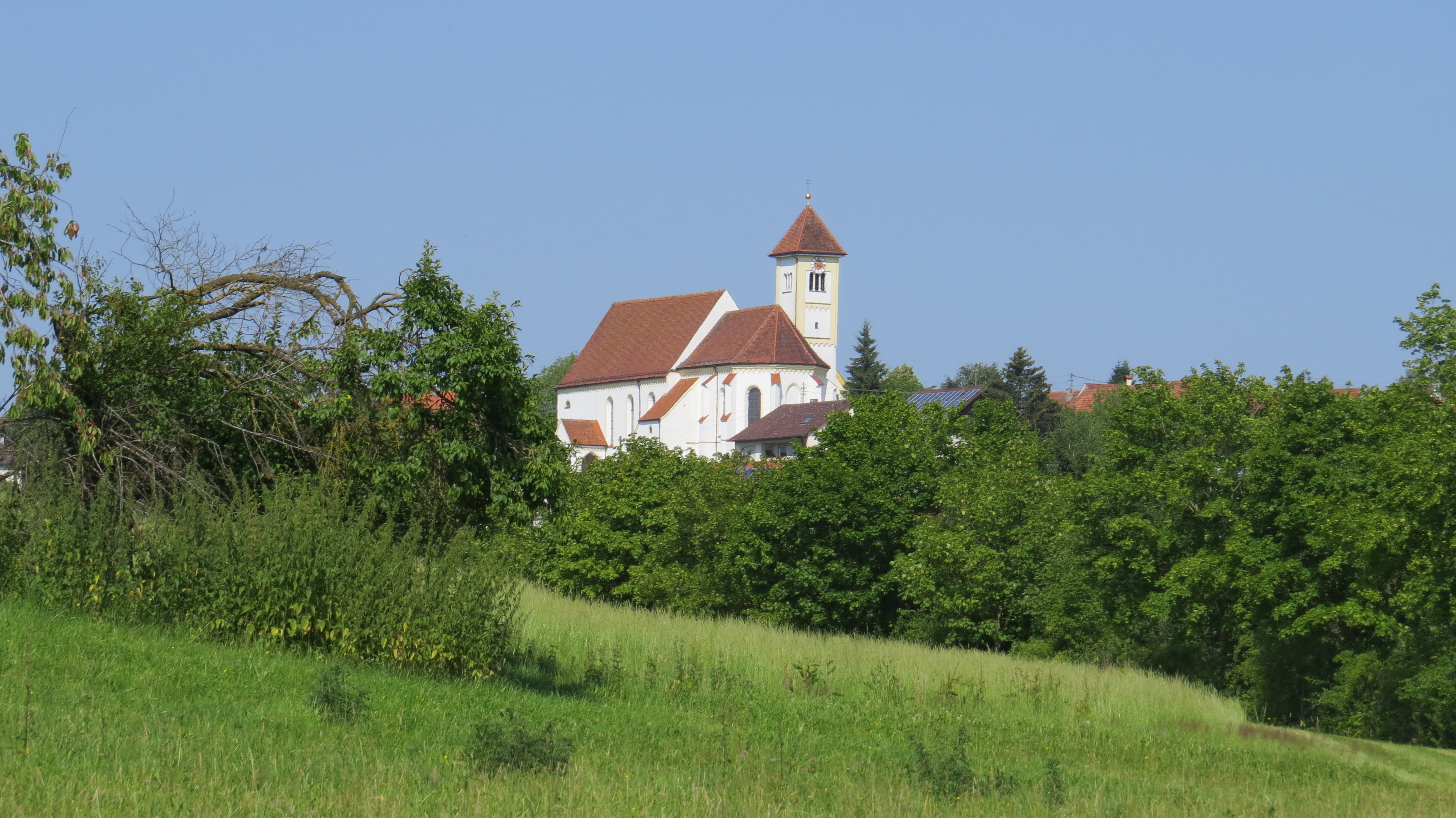 Markt Wald, Unterallgäu